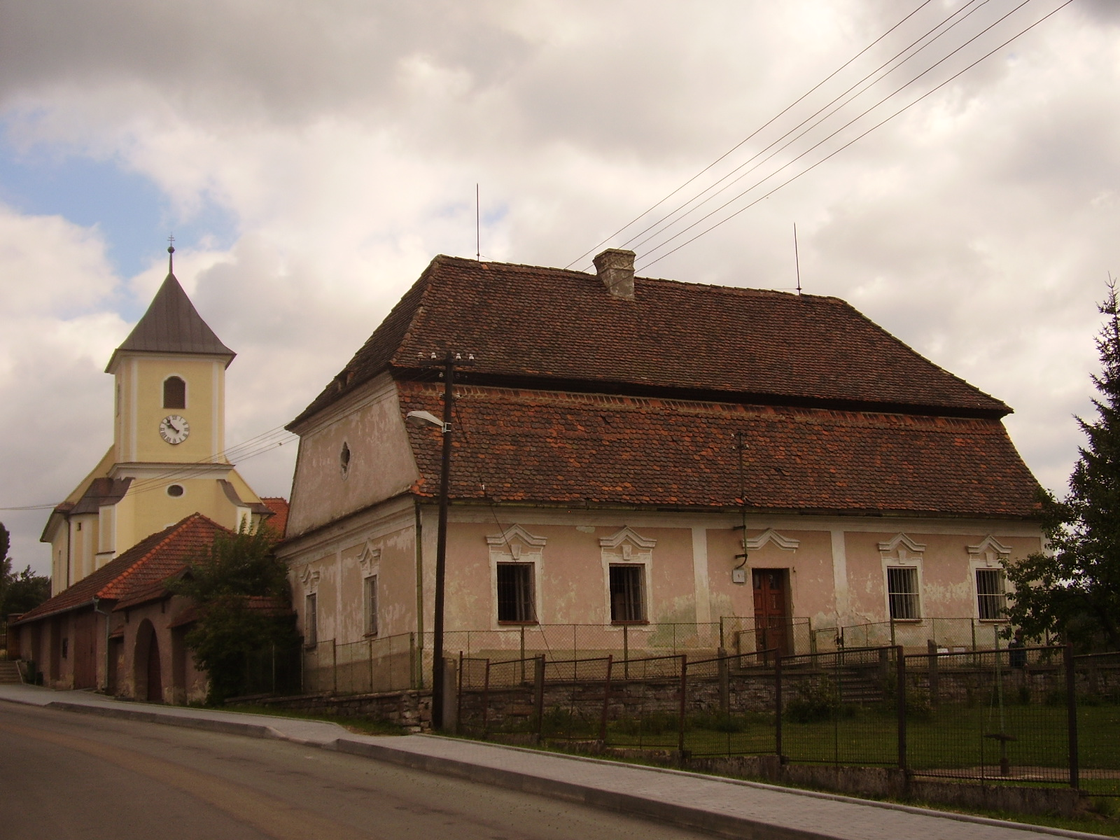 Fara (Černovice), Černovice 7